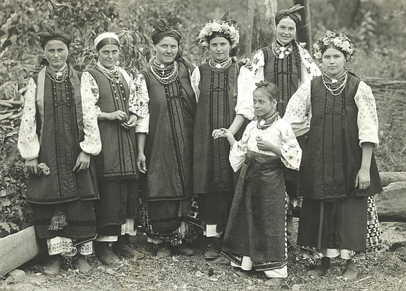 Весільна група. Полтавщина ХІХ ст. Молода і дружки у вінках, решта дівчат пов'язані хустками, які не накривають тім'я.[1]